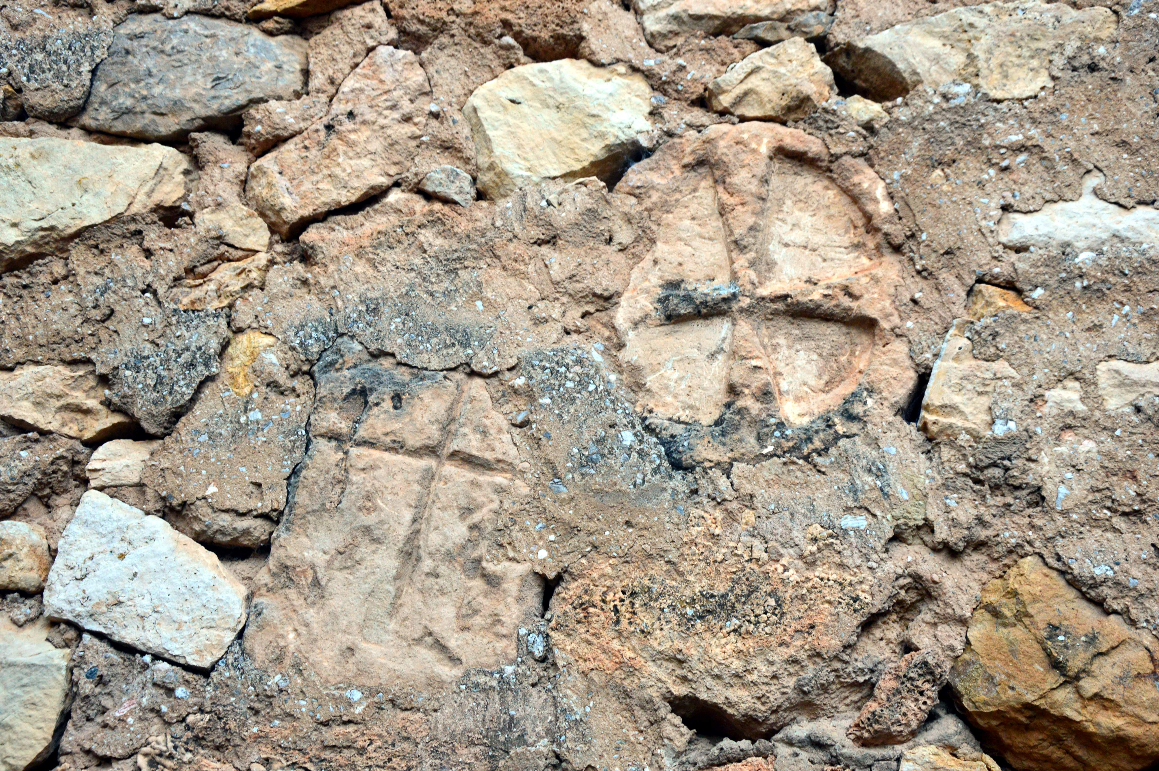 Detalle de estela funeraria discoidea halla en Castielfabib (Valencia), situada en el muro de un corral o descubierto, sector de la calle del Barrioso, correspondiente al recinto amurallado (2019).